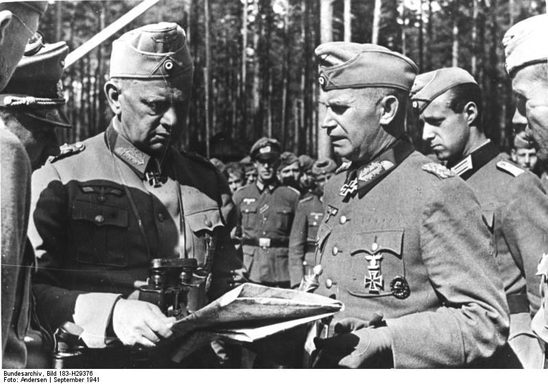 Scherl: Generalfeldmarschall von Reichenau. Bild Nr. A99224 herausg. 1.10.41 lässt sich von Ritterkreuzträger Generalleutnant Stapf, Bericht über die Lage erstatten. PK-Andersen-Pressebildzentrale [II.Text] ADN-ZB: Zentralbild II. Weltkrieg 1939-45 An der Front in der Sowjetunion, September 1941. Generalfeldmarschall Walter von Reichenau, der Führer der Armee, läßt sich von Generalleutnant Stapf einen Lagebericht geben.